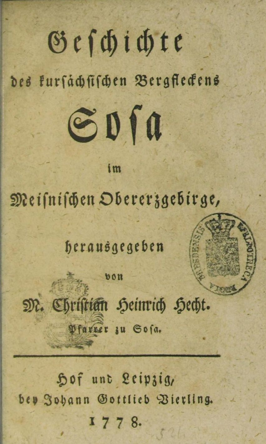 Sosa im Erzgebirge: Christian Heinrich Hecht: Geschichte des kursächsischen Bergfleckens Sosa im Meisnischen Obererzgebirge, Hof und Leipzig, 1778. (Digitalisat in der Staats- und Universitätsbibliothek Dresden) Titelblatt